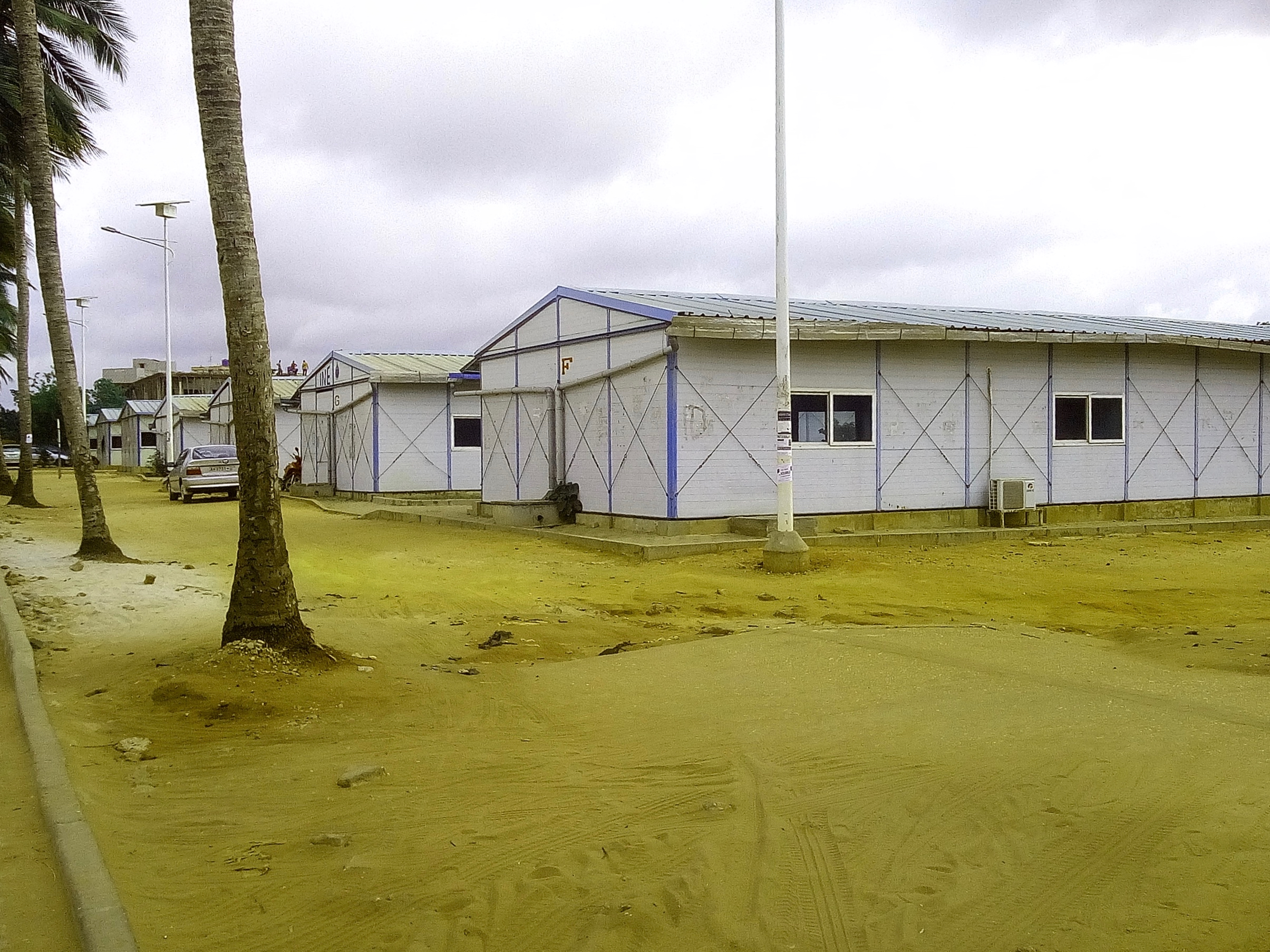 uac zone master bénin